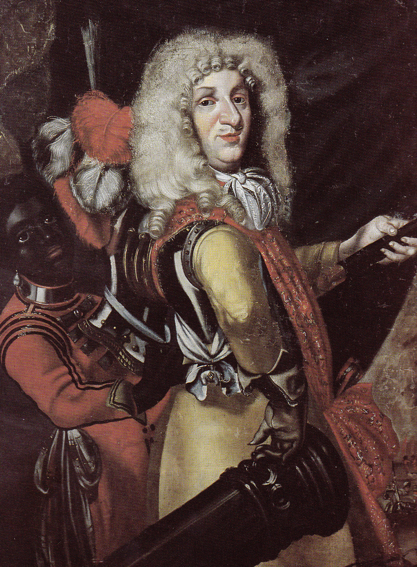 Ulrik Frederik Gyldenløve, kopi av maleri. Tilhører Eidsvollminnet (Eidsvoll 1814)